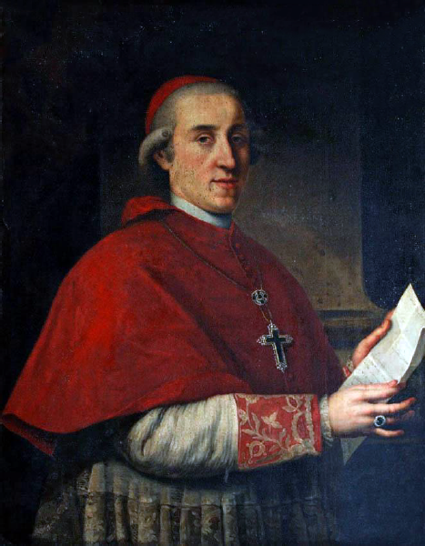 Cardinale Ferdinando_Maria_Saluzzo_(Napoli_1744_–_Roma_1816) / Ritratto di Ferdinando_Maria_Saluzzo_ (Santuario della Madonna di Schiavonea - Corigliano Calabro)